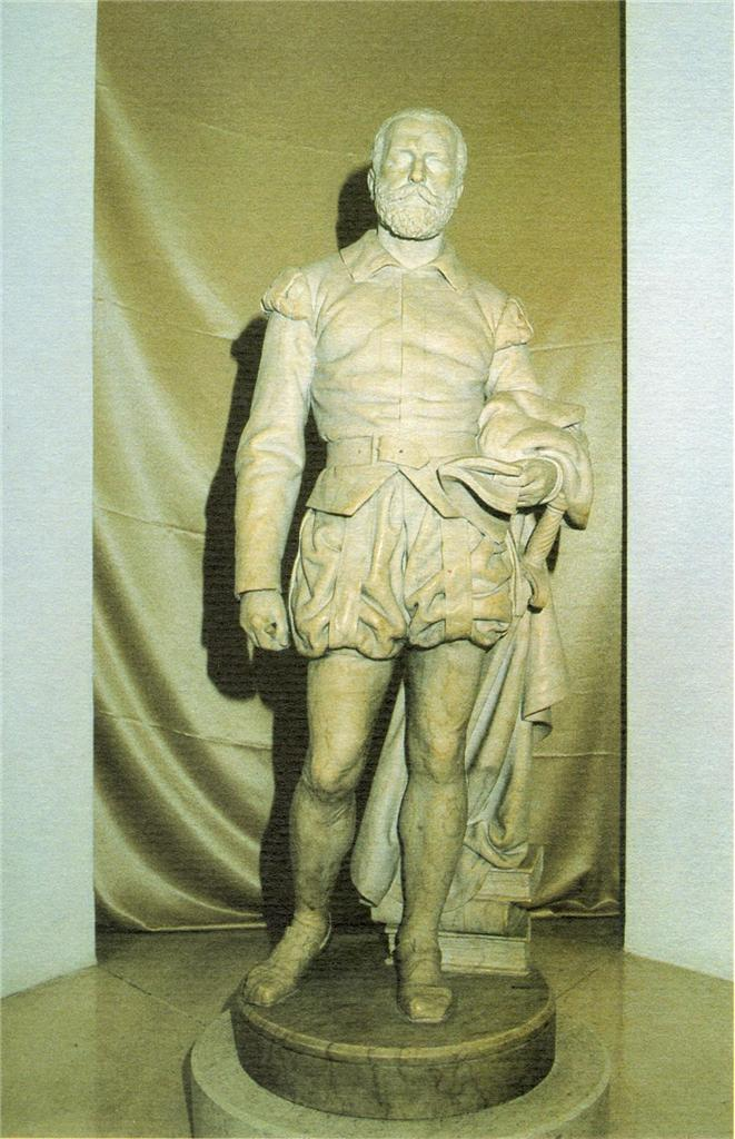 Título: Camões Procedência: Clube Figueiroense - Casa da Cultura (Figueiró dos Vinhos). Data: Sem data. Observações: Esta imagem foi retirada do catálogo da exposição realizada de 23 de Junho a 7 de Julho de 2001 na Casa da Cultura – Clube Figueiroense. CÂMARA MUNICIPAL DE FIGUEIRÓ DOS VINHOS. GADEL - Homenagem a Simões de Almeida tio e sobrinho : exposição de esculturas. Figueiró dos Vinhos : Câmara Municipal. GADEL, [2001].